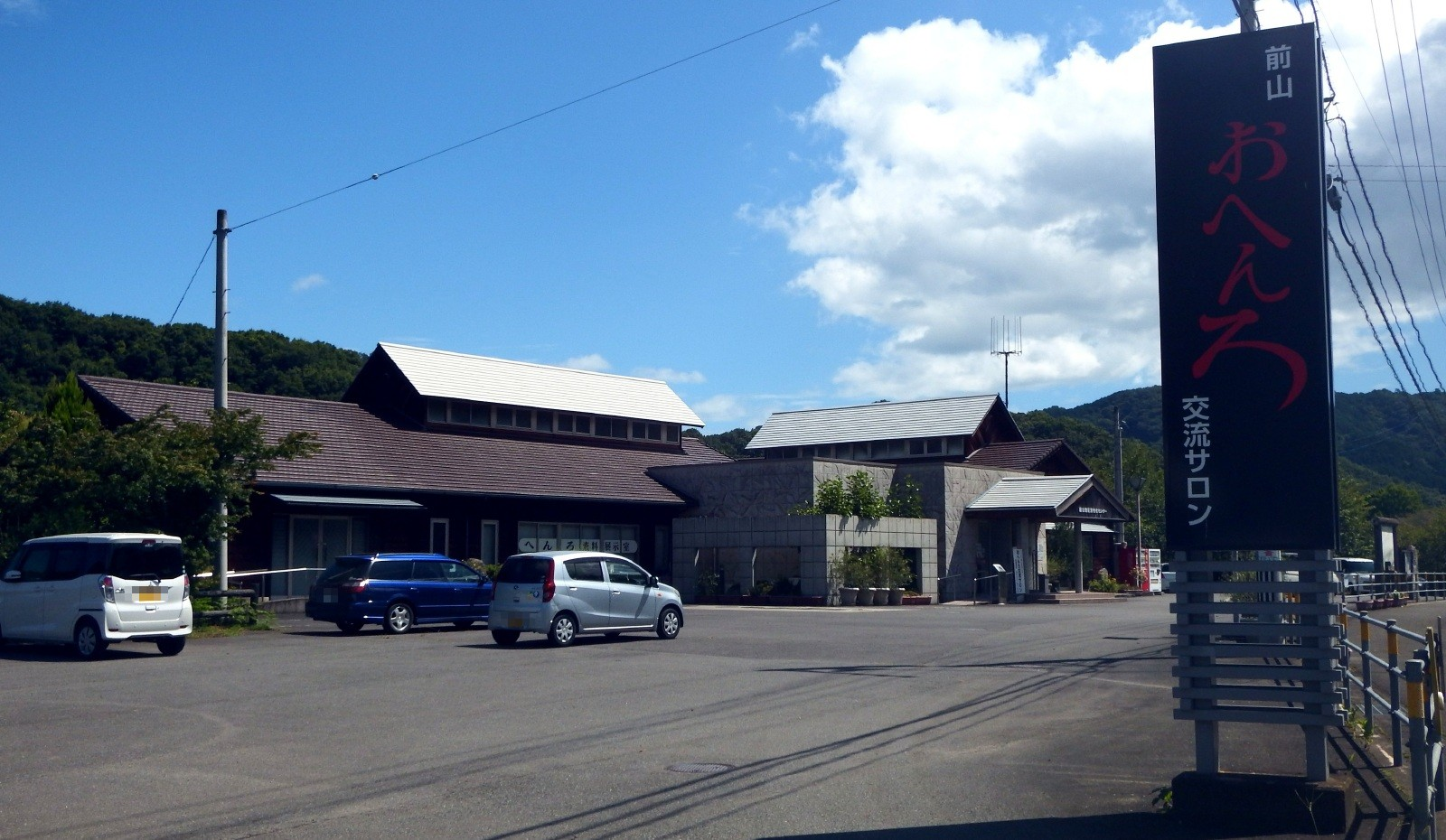 前山おへんろ交流サロン